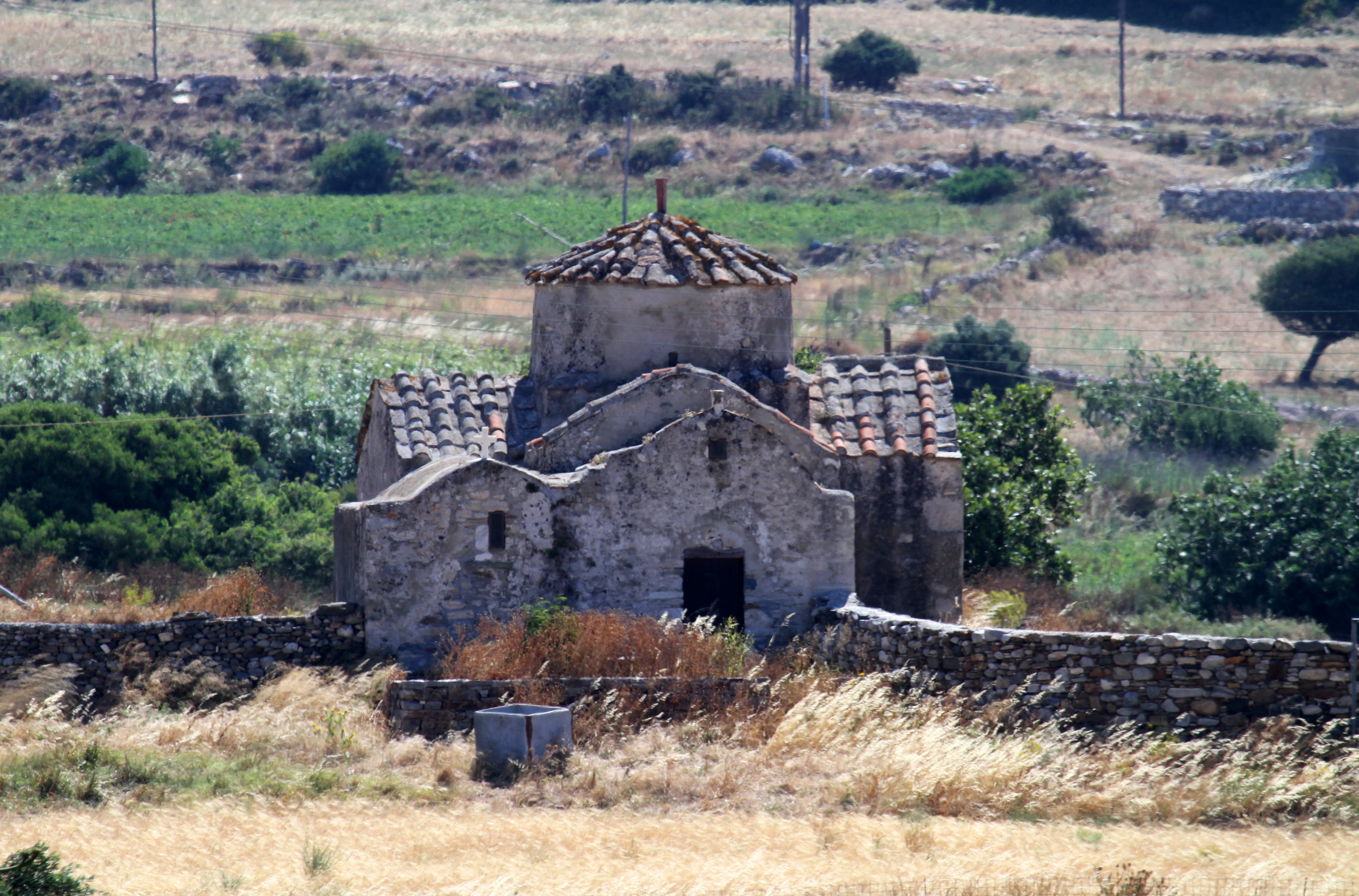 Chiesa bizantina nei pressi di Ano Sangri